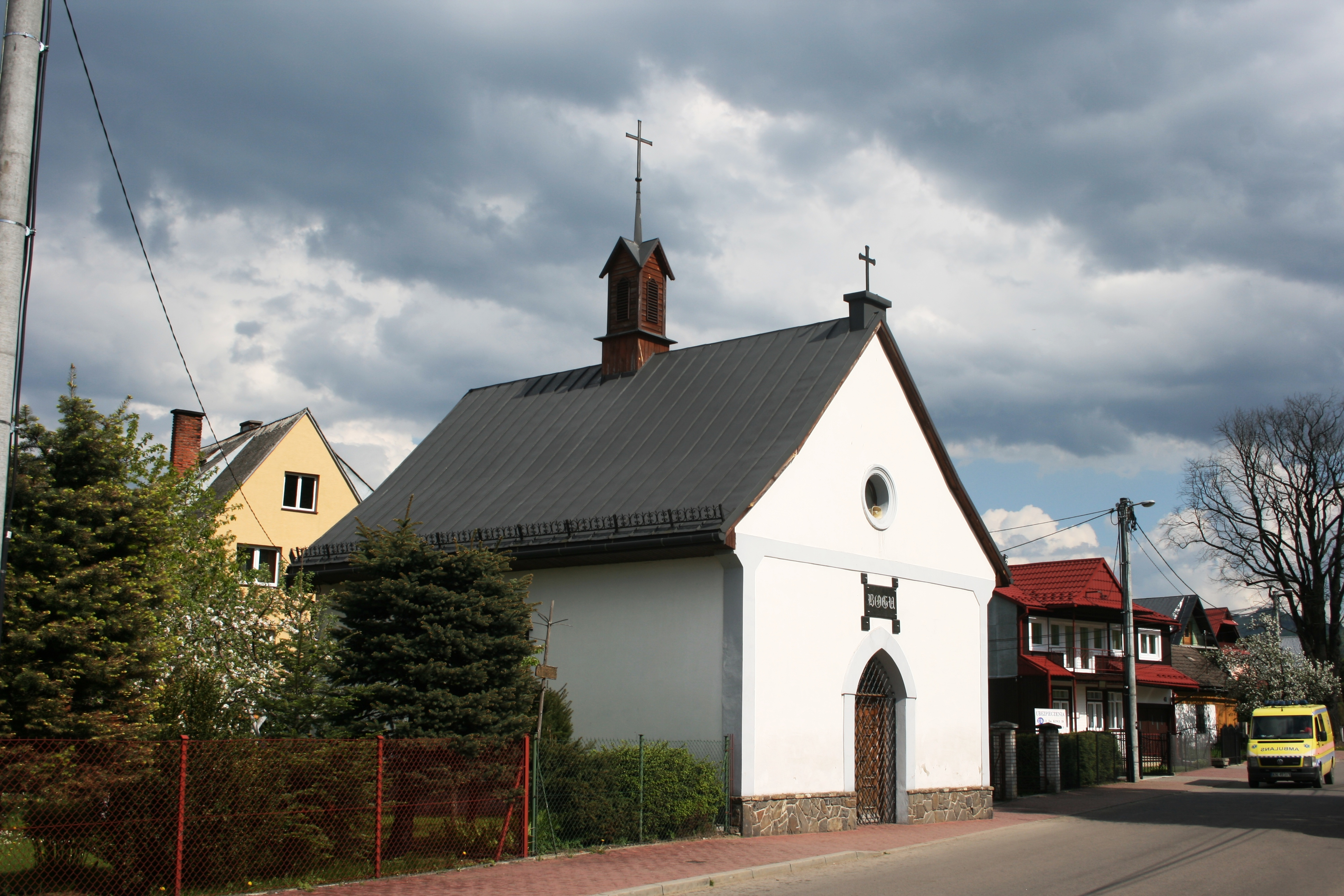 Kaplica Przemienienia Pańskiego przy ul. Św. Kingi w Krościenku - widok od północy